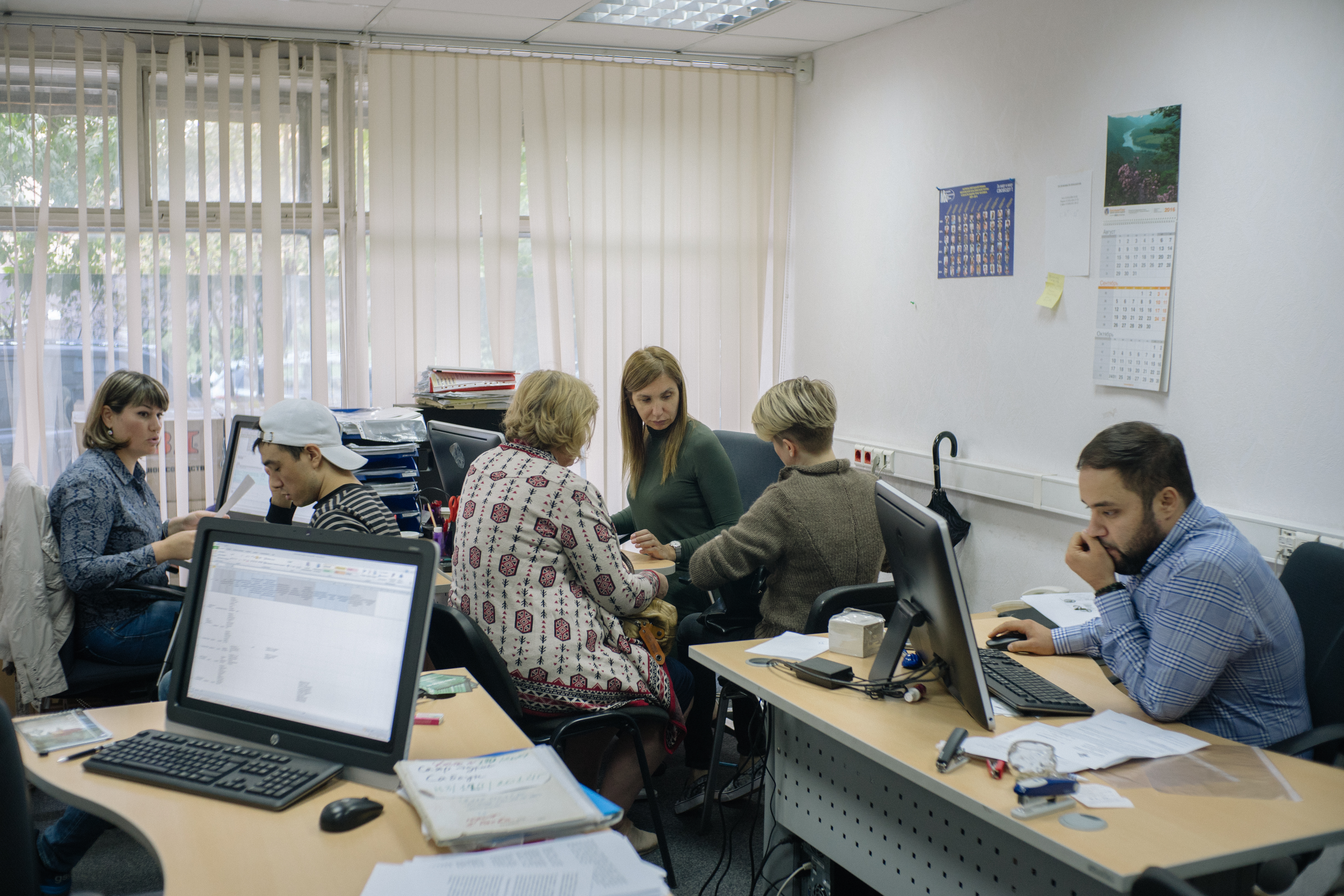 Прием юристов в Комитете